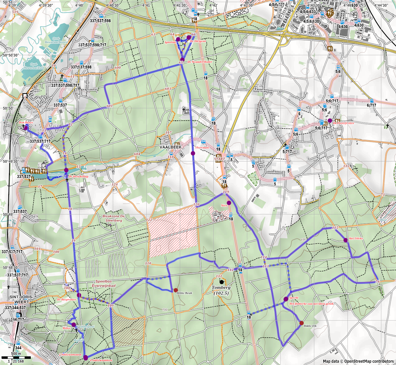 Rendering van 't Pad van Ad met Maperitive